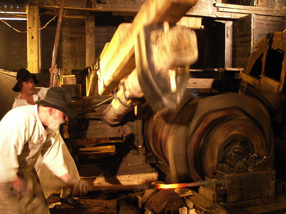 Vallonsmedjan i Österbybruk är världens sista bevarade vallonsmedja. Den iståndsattes 2006. Hasse Gille var vallonsmed i 14:e generationen.